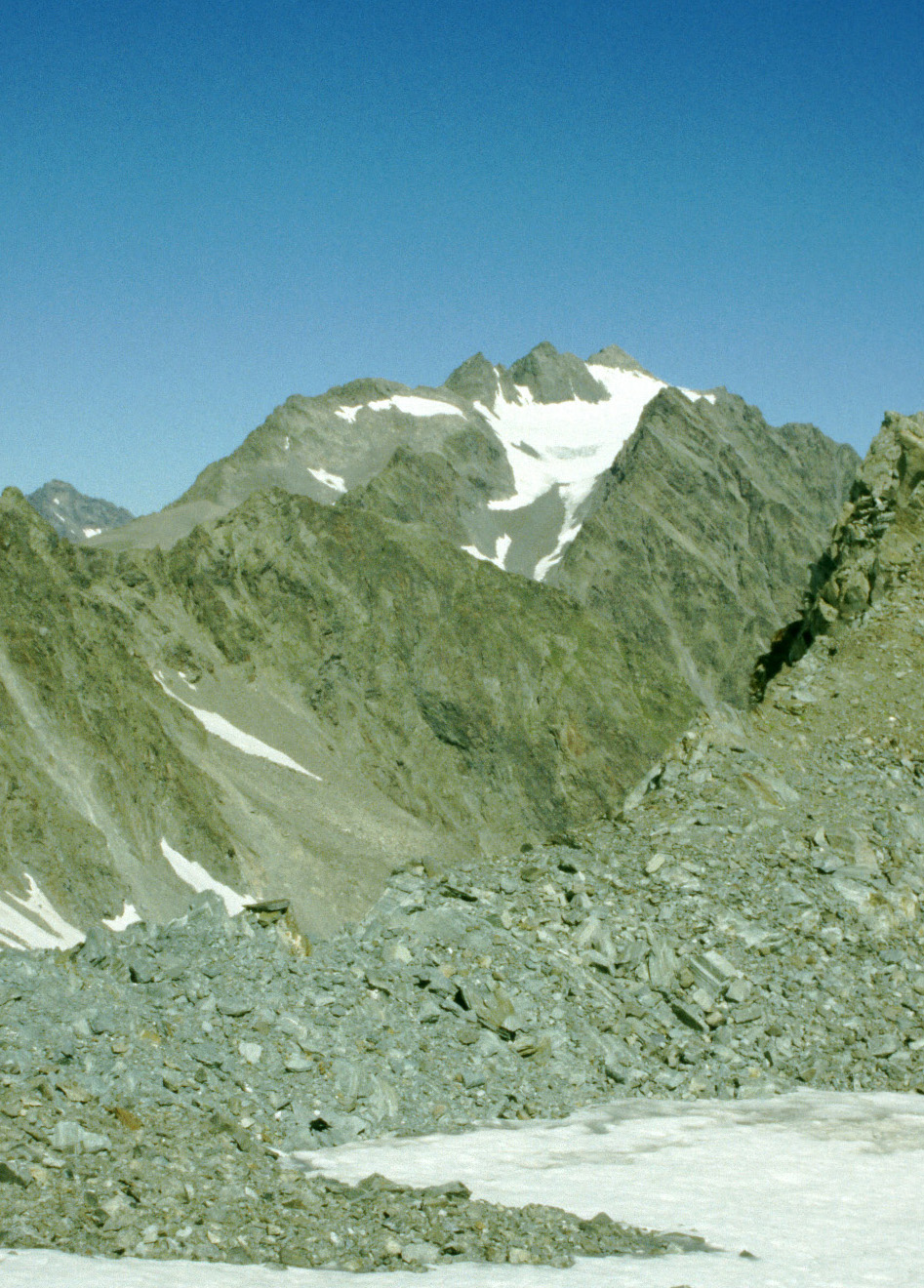 Hoher Seeblaskogel von Süden, vom Längentaler Ferner